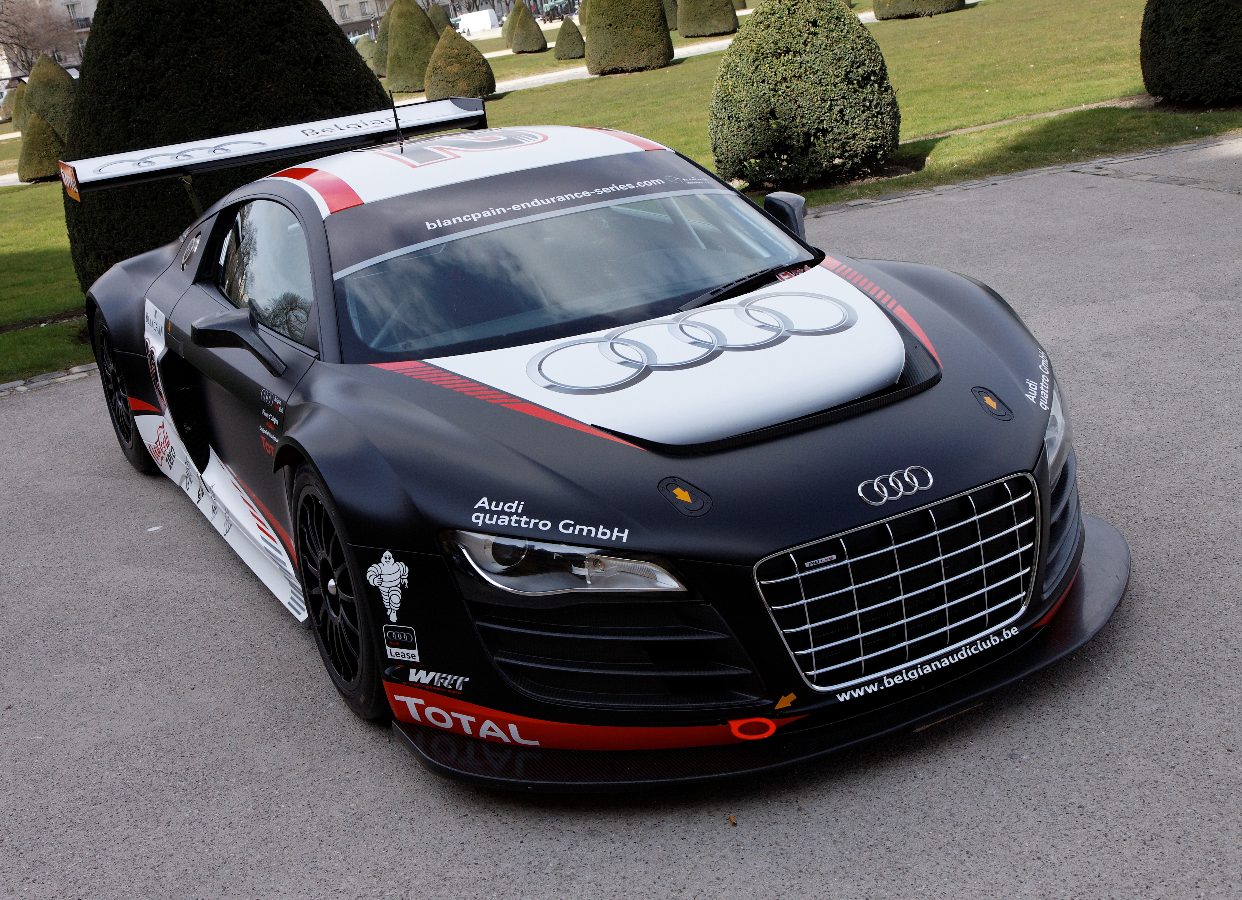 Photographie prise lors de la présentation du Blancpain Endurance series aux Invalides à Paris en mars 2011.